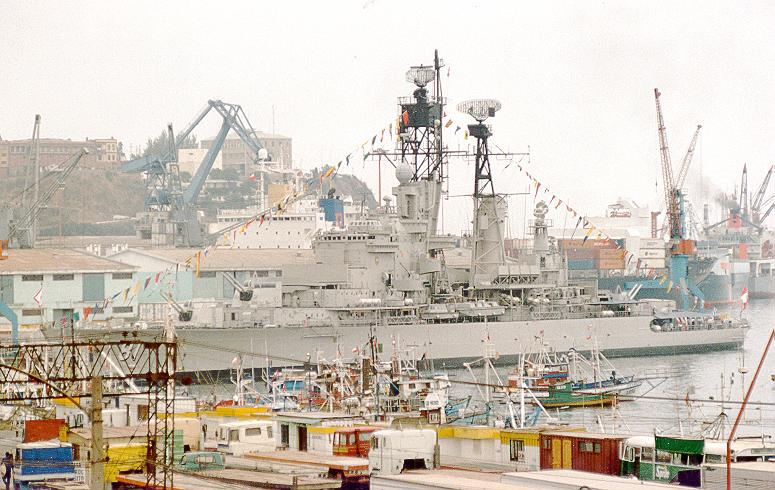 Crucero Almirante Grau CM-83